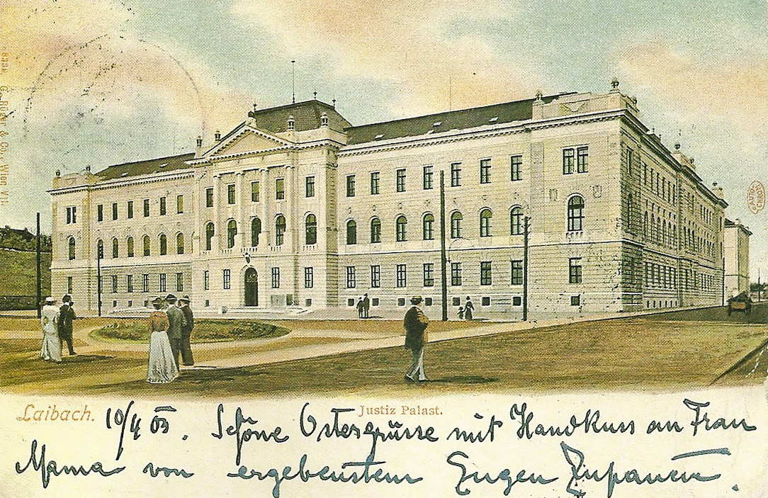 Razglednica slovenskega trga s sodno palačo.